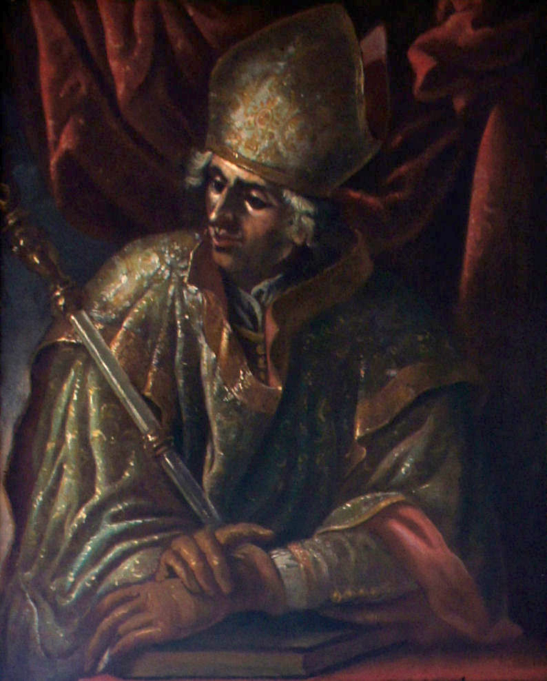 Porträtgemälde von Nikodemus della Scala, Fürstbischof von Freising, im Fürstengang zwischen Fürstbischöflicher Residenz und Freisinger Dom.